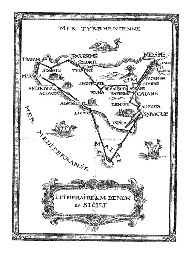 Itinerario del grand tour in Sicilia e a Malta